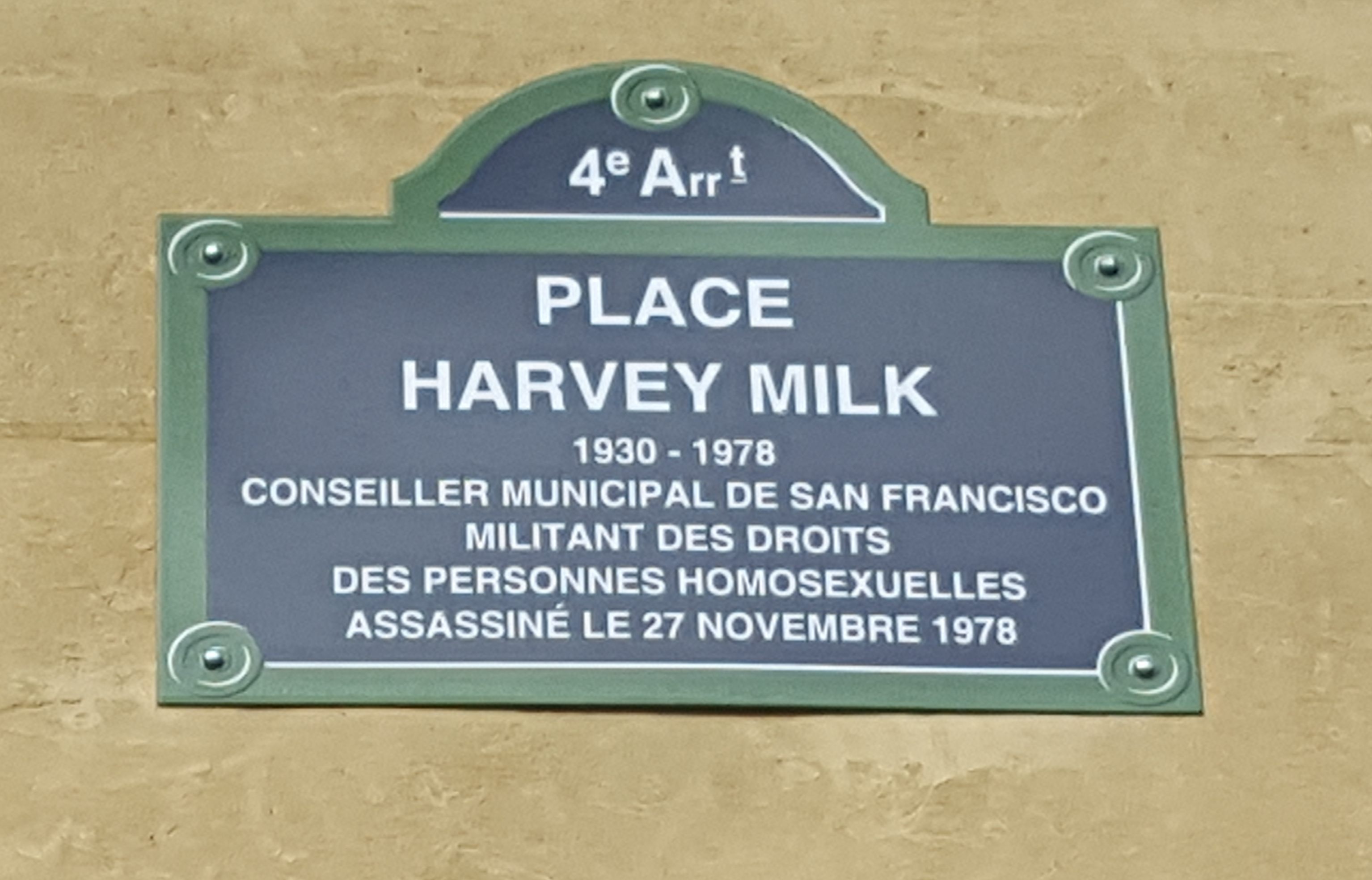 Plaque de rue de la place Harvey Milk, Le Marais, Paris, France.